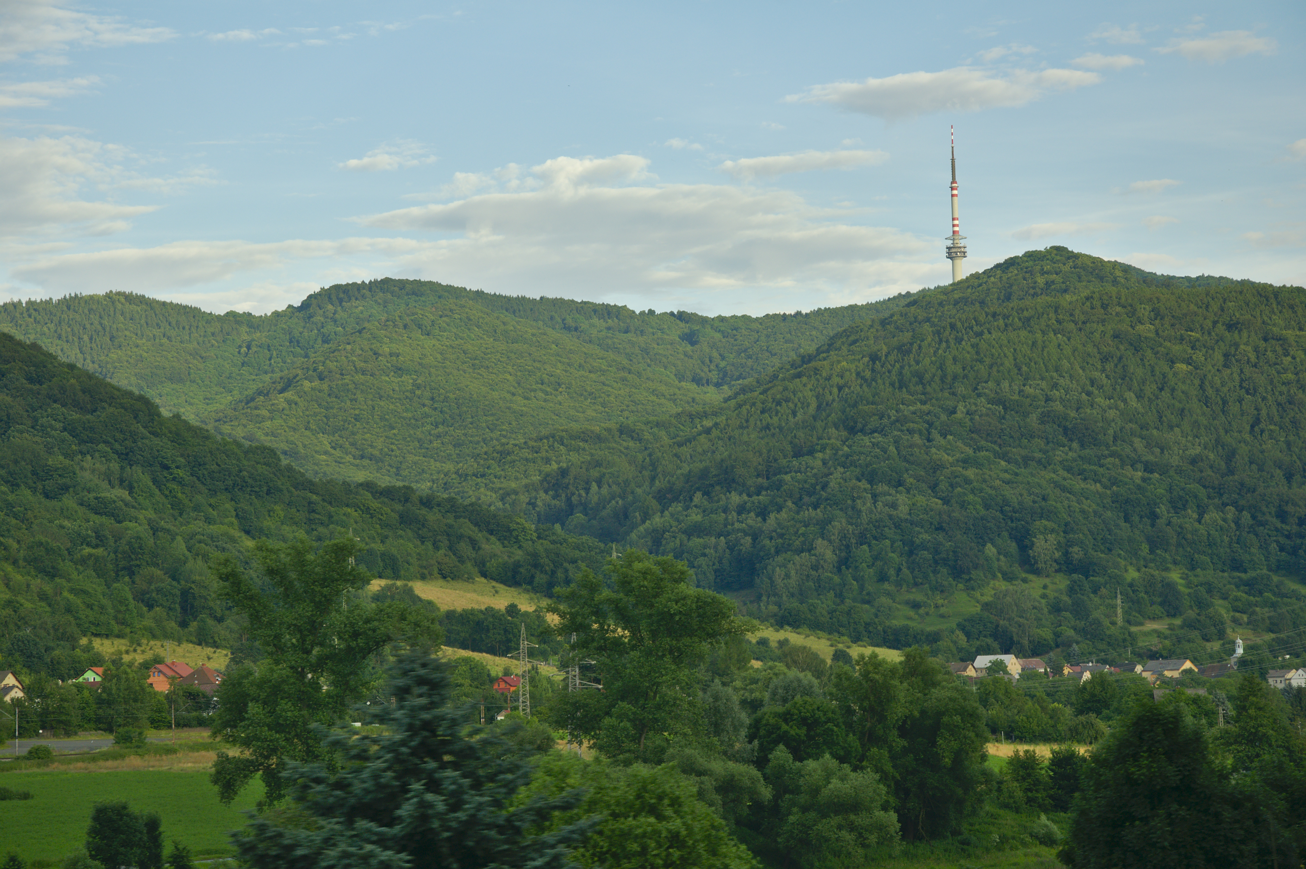 Těchlovice, nad ní vysílač Buková hora, před ní vrchol Stříbrný roh, okres Děčín